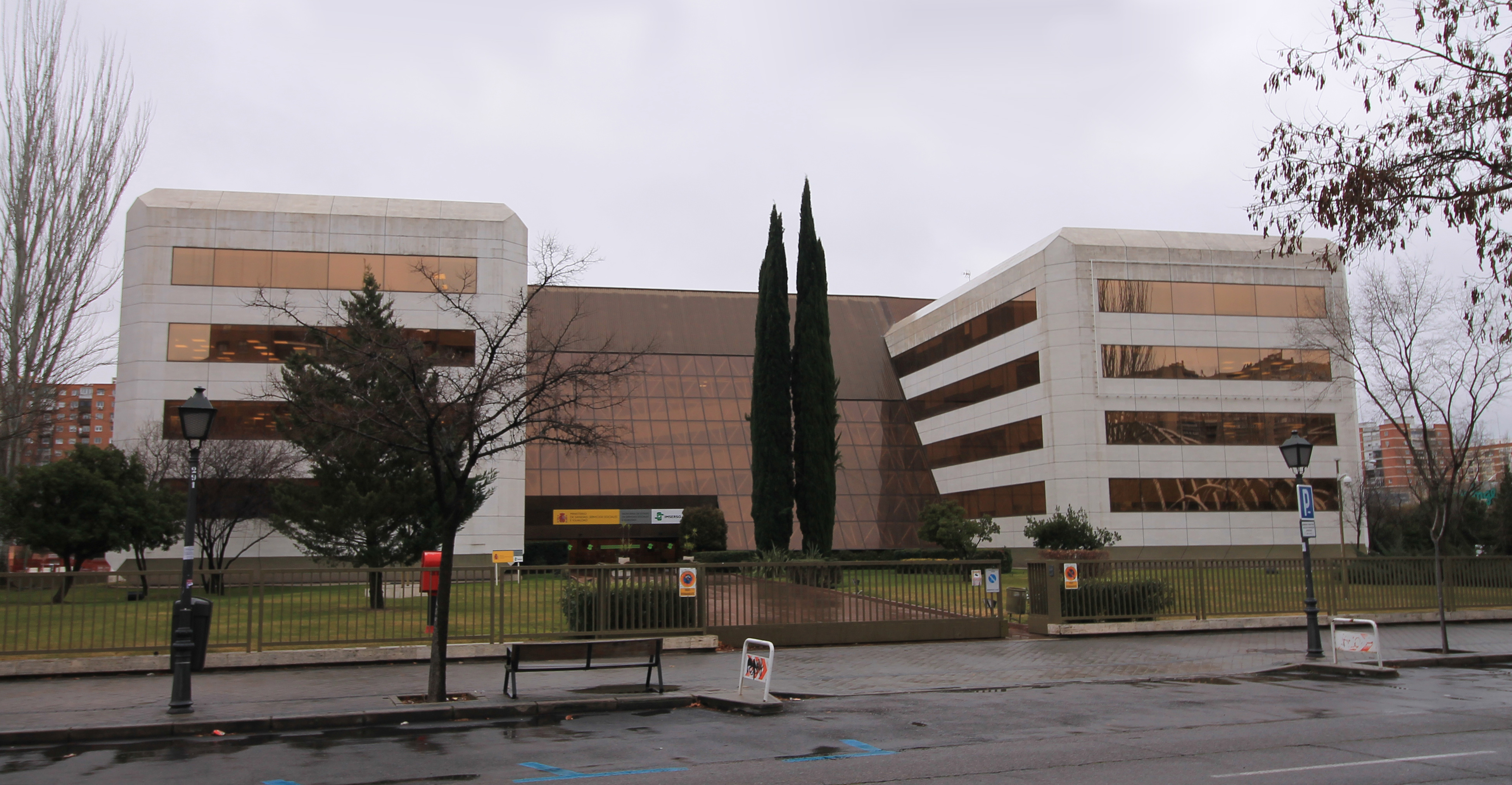 Sede principal del Instituto de Mayores y Servicios Sociales (IMSERSO), en la Avenida de la Ilustración de Madrid (España).